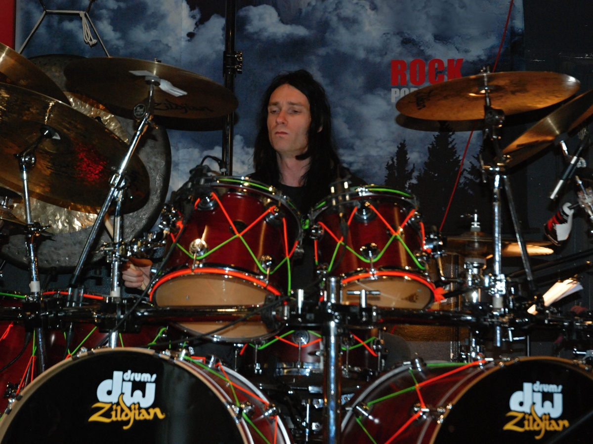 Štepán Smetáček na Arakain Memorial Tour 2012 (vzpomínka na Arakain) ve Zlíně